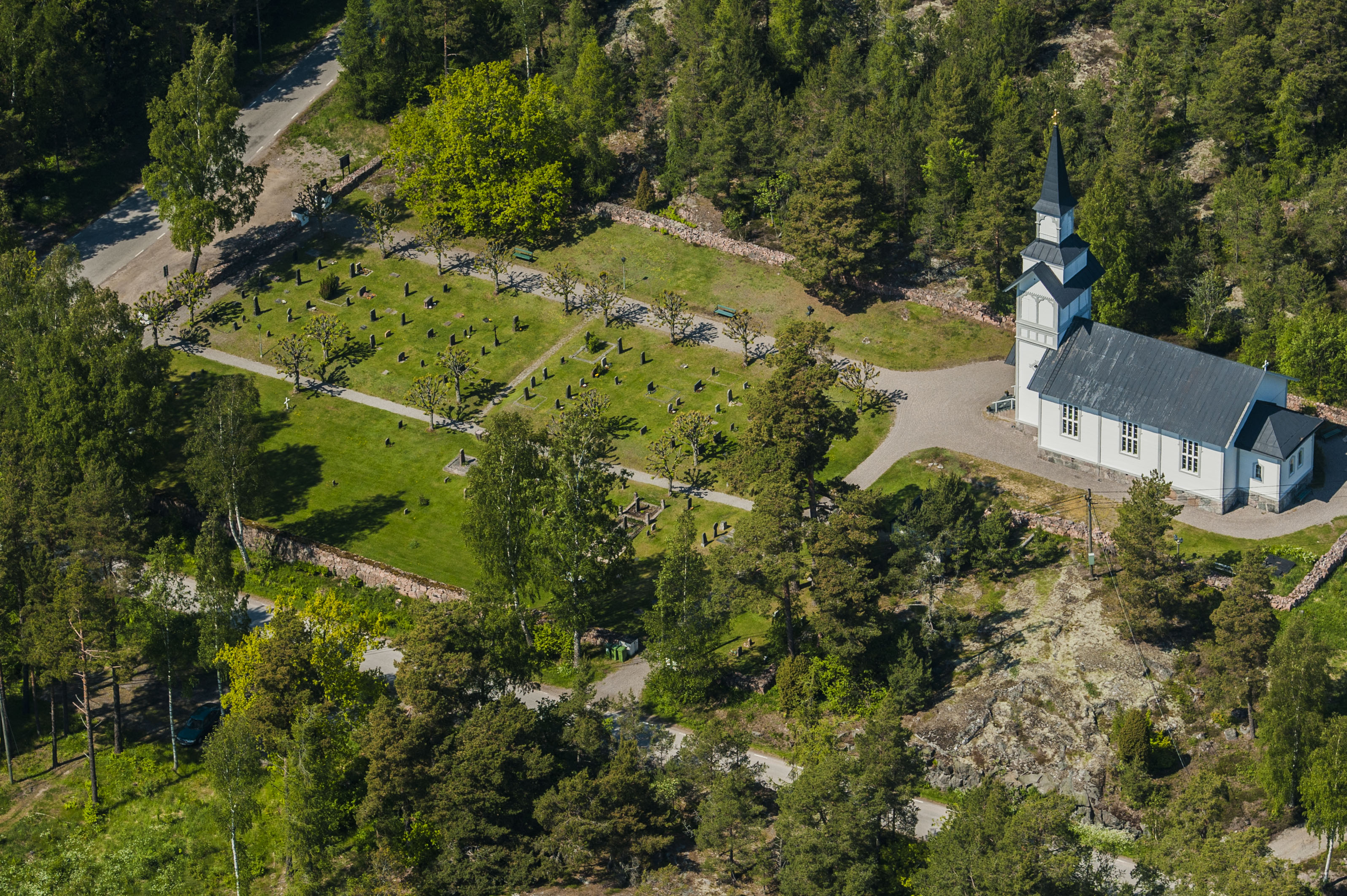 Ornö ka